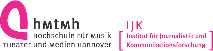 offizielles IJK Logo